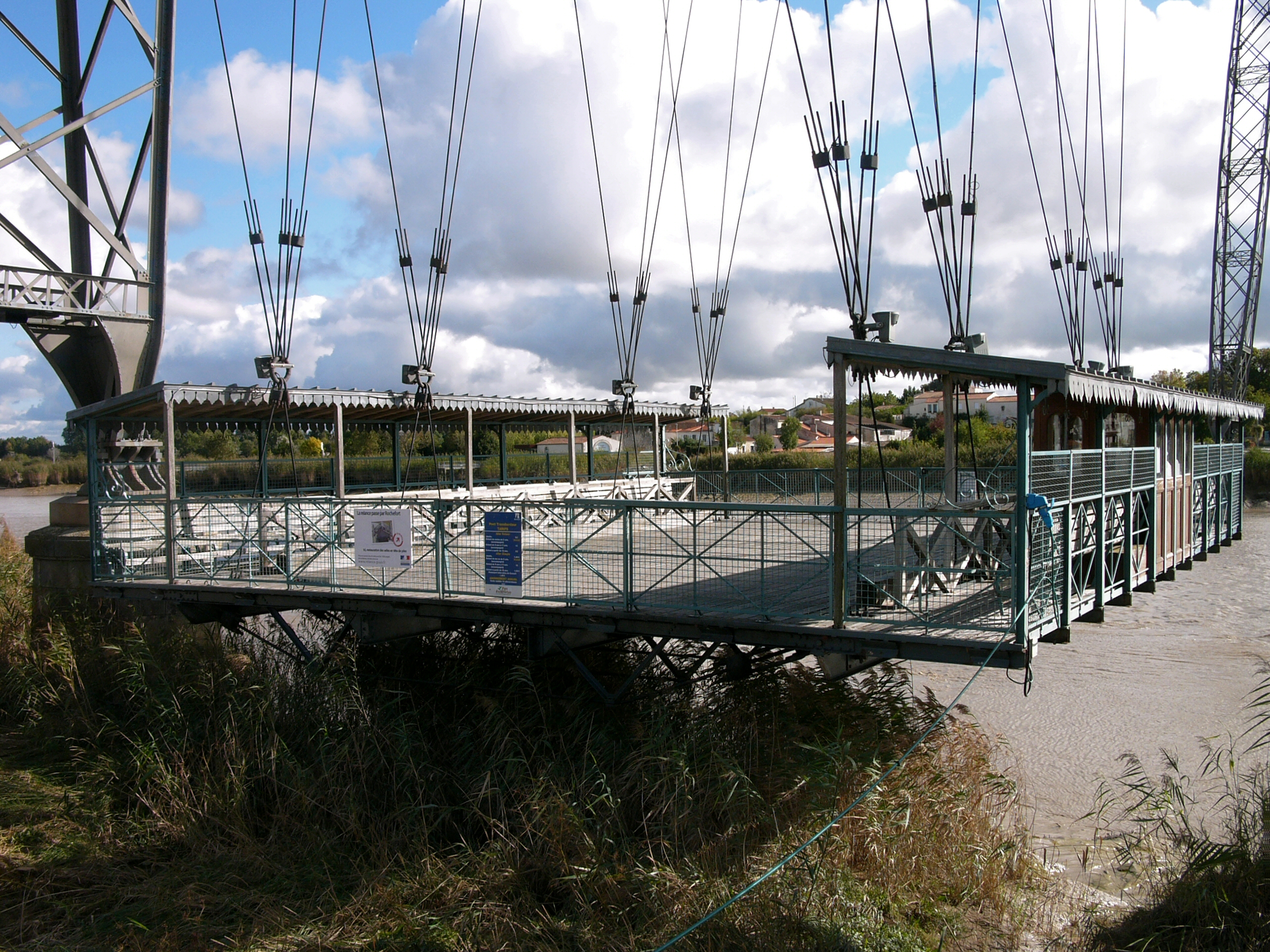 Nacelle du Pont Transbordeur de Martrou Rochefort Charente Maritime France